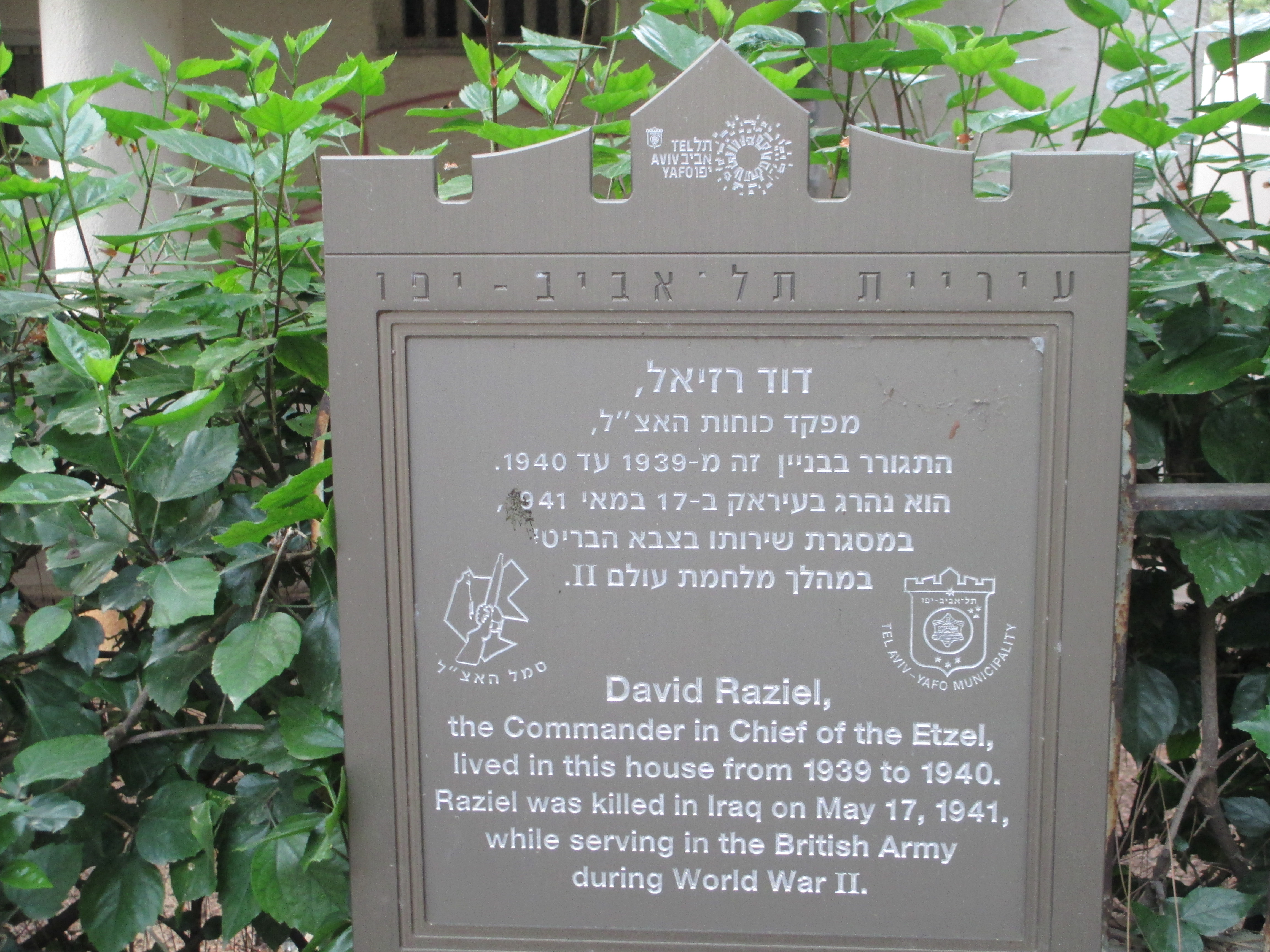 לוחית זיכרון על ביתו של דוד רזיאל בתל אביב ברח' הנביאים מס' 30